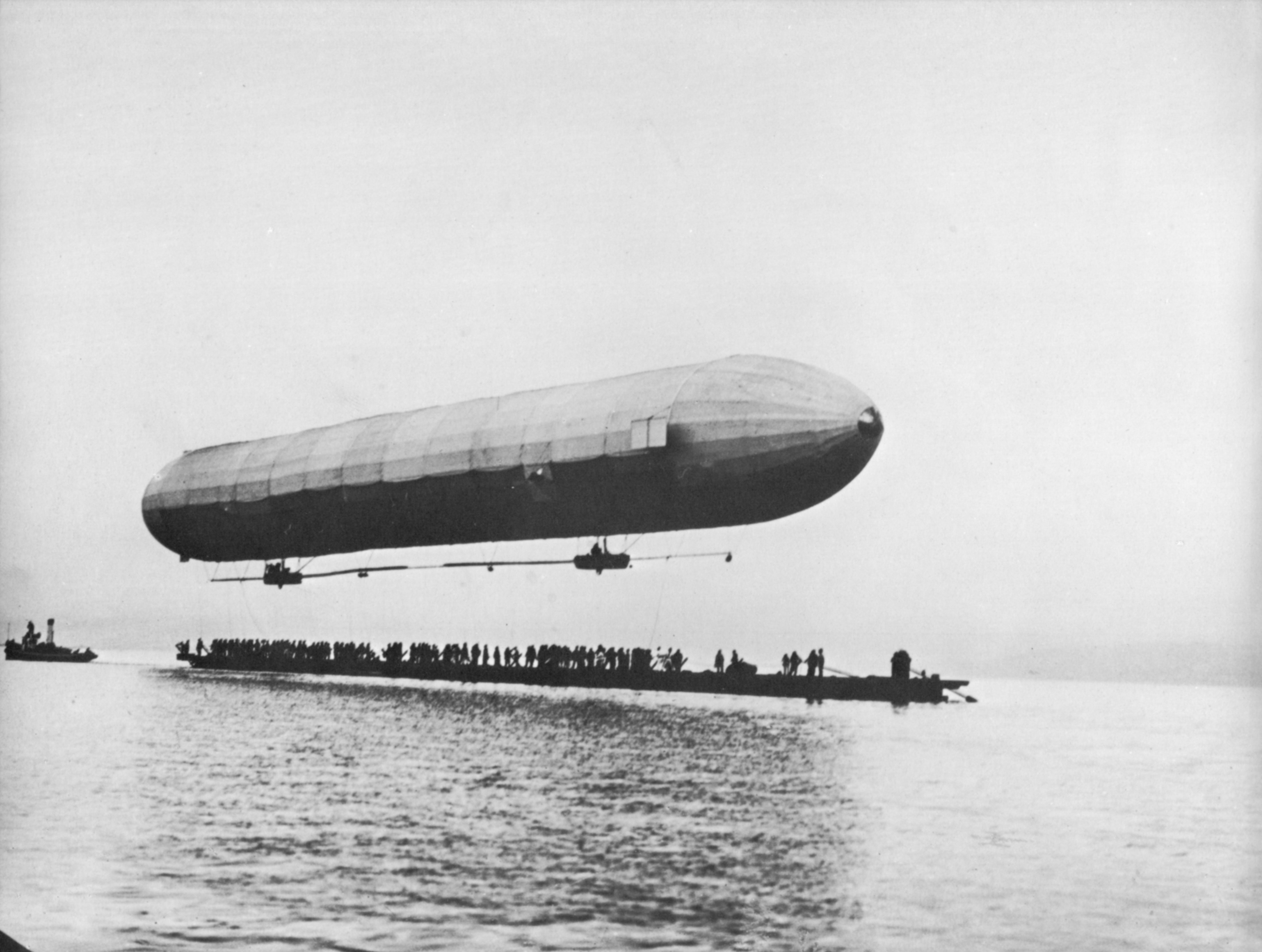 Zeppelin über dem Bodensee